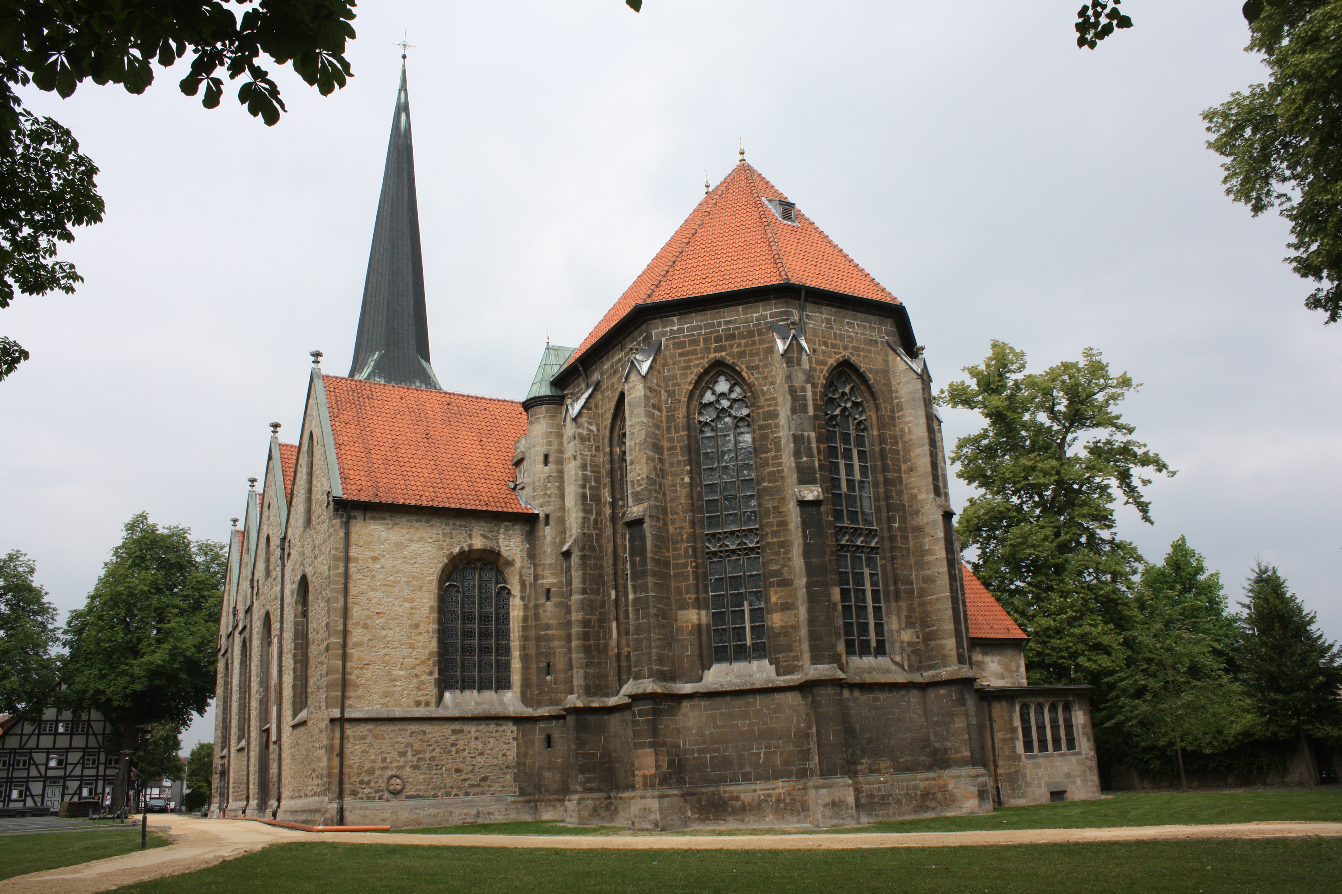 St. Michael in Brakel, Ostansicht